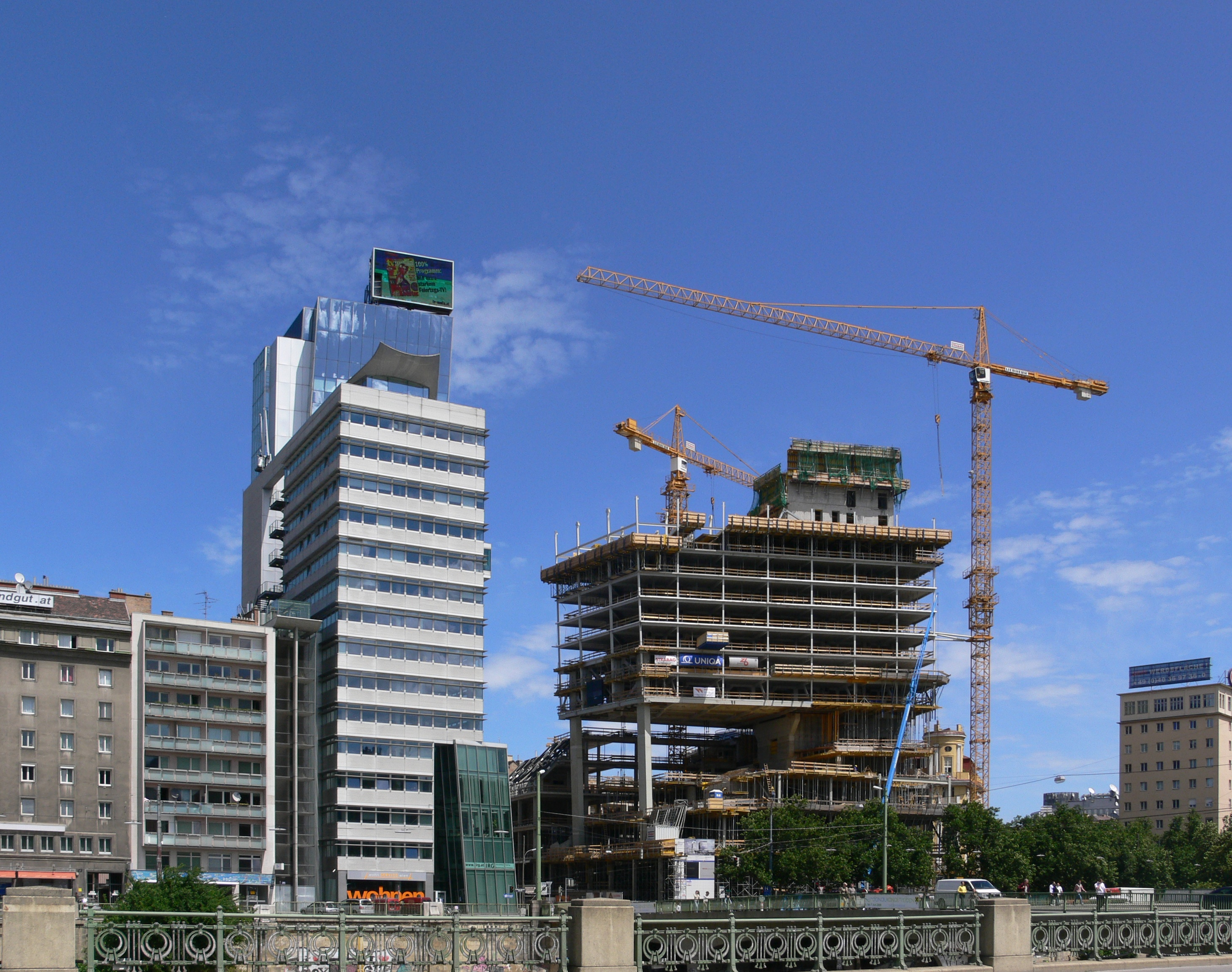 Wien, Uniqa Praterstraße 1, im Bau